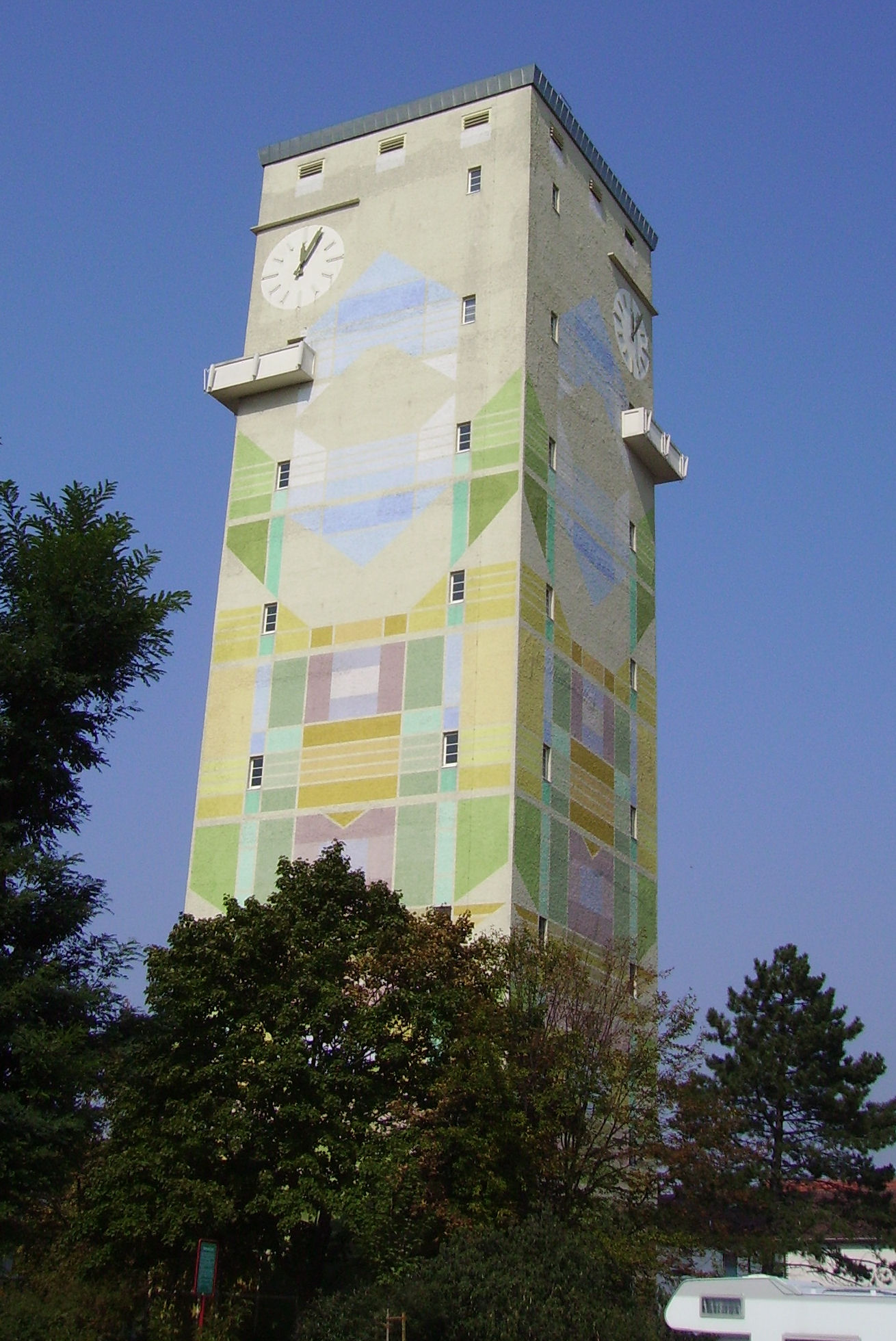 Water tower, Mutterstadt in Rheinland-Pfalz (Germany)